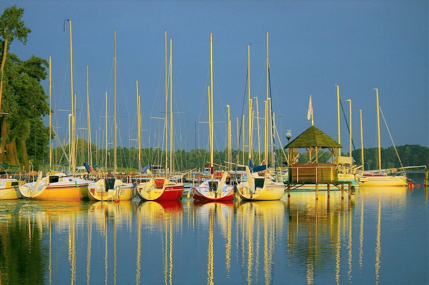 Ostróda. Przystań.